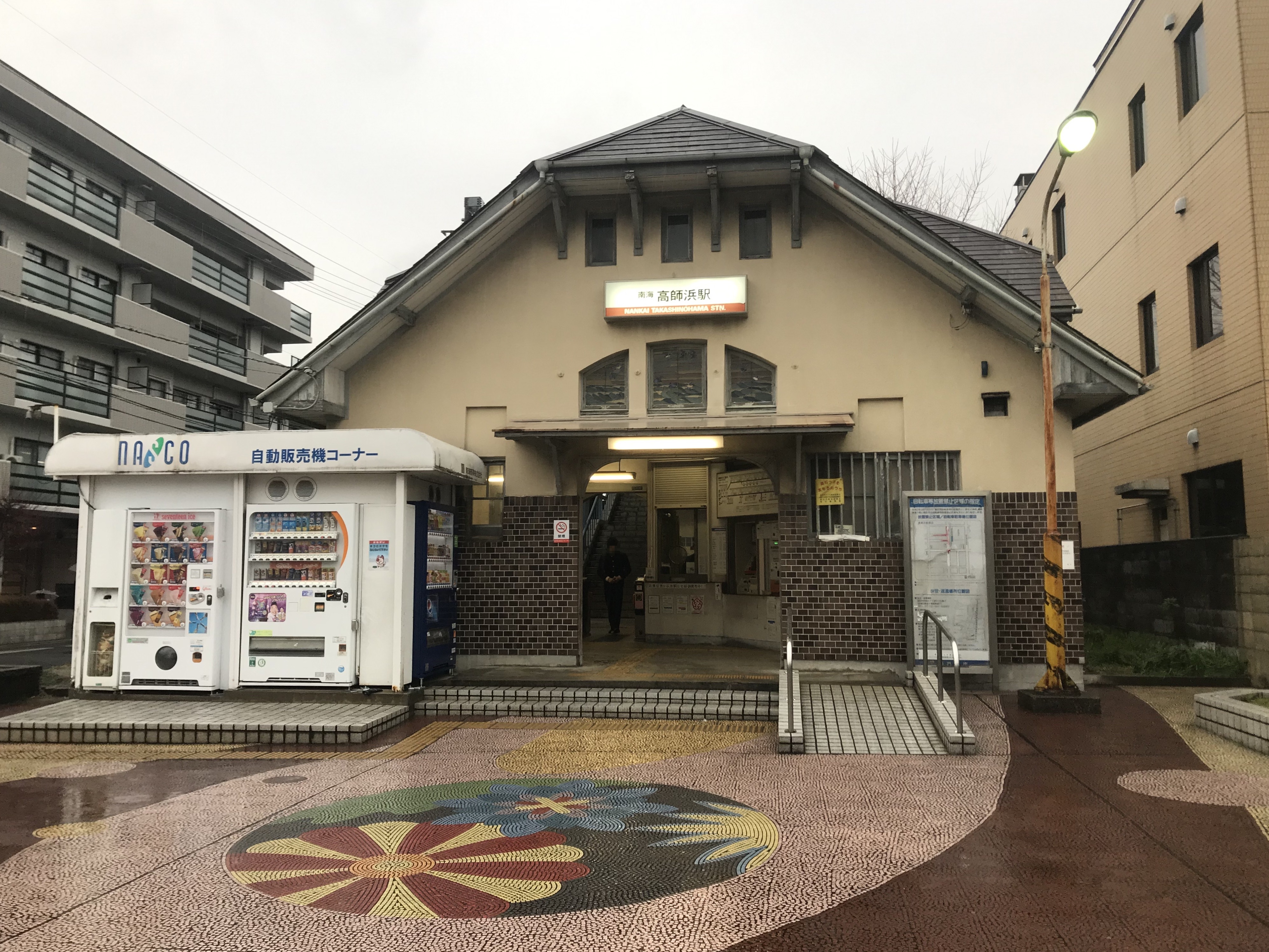 高師浜駅の駅舎